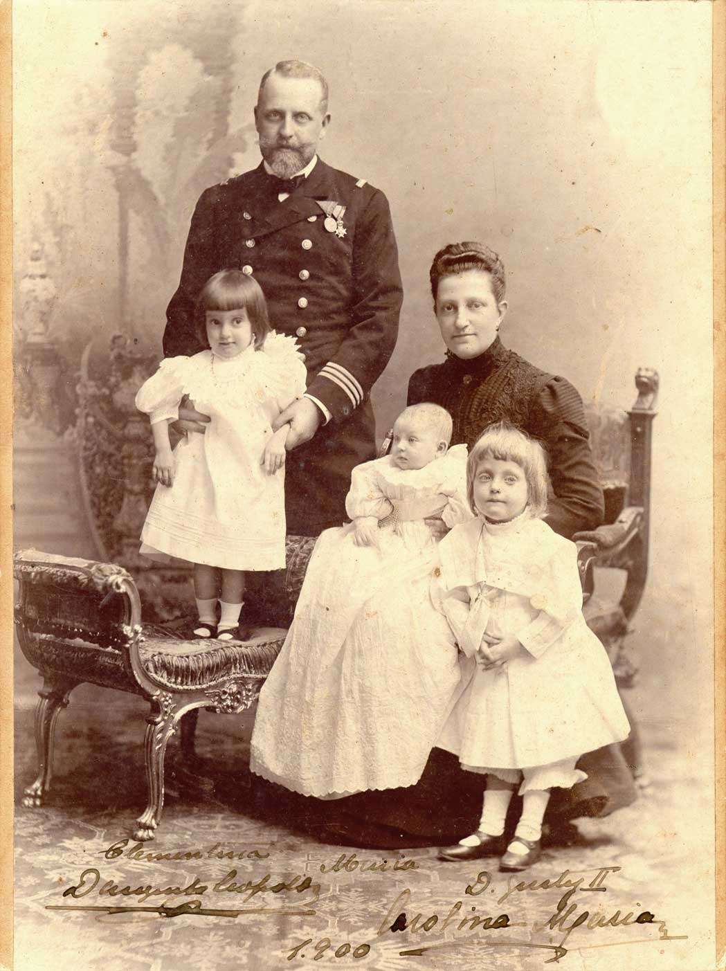 Príncipe Dom Augusto Leopoldo de Saxe-Coburgo e Bragança com sua esposa, a Arquiduquesa Carolina Maria de Áustria-Toscana, e três de seus filhos (a partir da esquerda): Princesa Clementina, Princesa Maria e Príncipe Augusto.